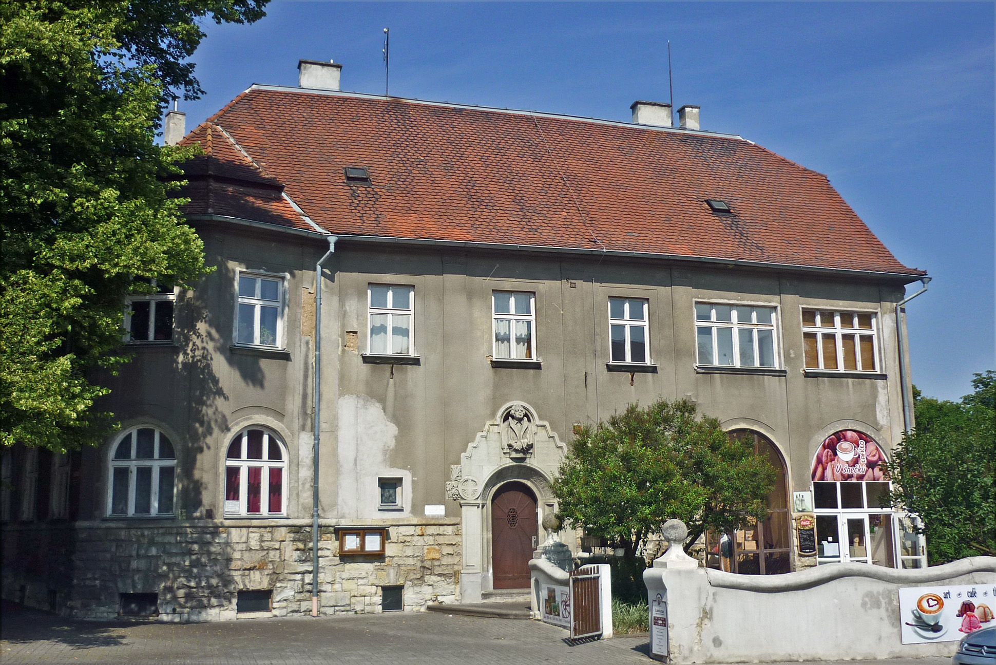 Das Pfarrhaus der evangelisch-lutherischen Kirche in Saaz (Žatec), Reitschoweser Str. 1200 (jetzt Husova 1200), erbaut 1911-12 von Josef Petrovsky nach einem Entwurf von Karl Lehrmann.